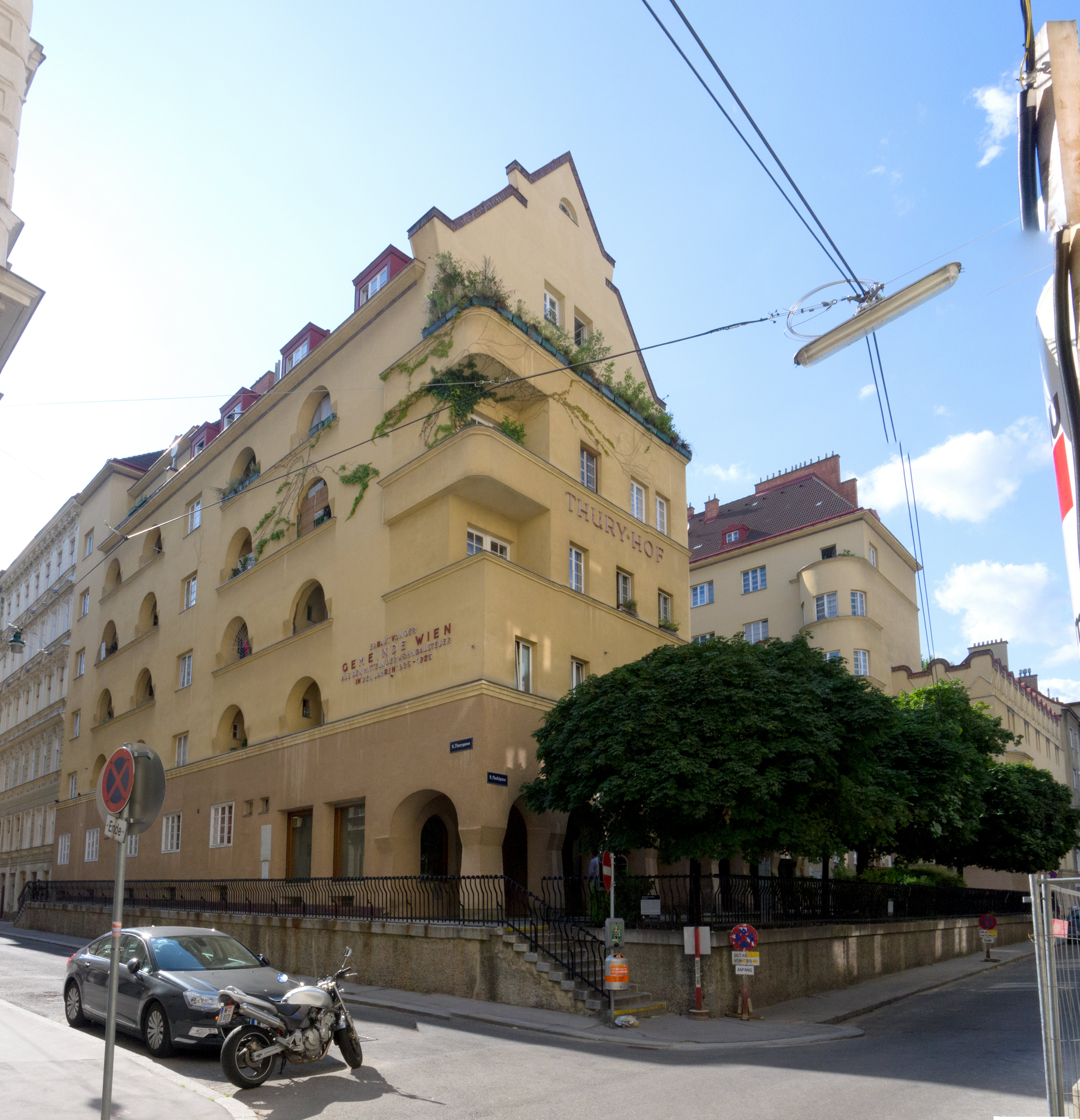 Thuryhof - Wohnhausanlage der Gemeinde Wien